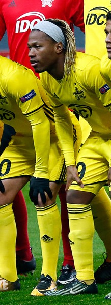 FC Sheriff Tiraspol